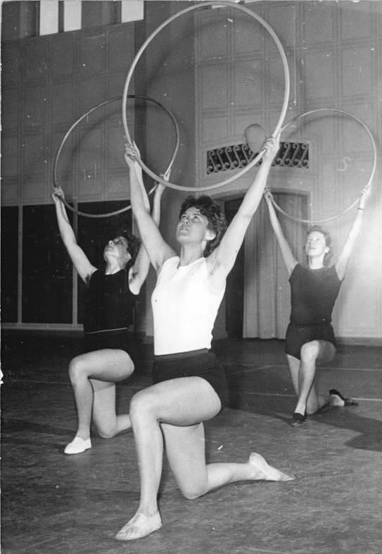 Leipzig, DHfK, Gymnastik Zentralbild Funck,Wendorf-Bay-Qu 19.4.1956 DHfK für das II. Deutsche Turn- und Sportfest. Auch die Deutsche Hochschule für Körperkultur (DHfK) in Leipzig wird in der zeit vom 2. bis 5. August 1956 wesentlich zum Gelingen des II. Deutschen Turn- und Sportfestes beitragen. Die jungen Studenten haben einige Übungen einstudiert, die sie vor den 100.000 in Leipzig zeigen werden. Über 700 Sportler der DHfK werden die Zuschauer mit ihren Reifenübungen, Gymnastikübungen usw. erfreuen. UBz: Ausschnitte aus den Reifenübungen der Leipziger Studentinnen.